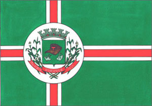 CurveloMG-Bandeira